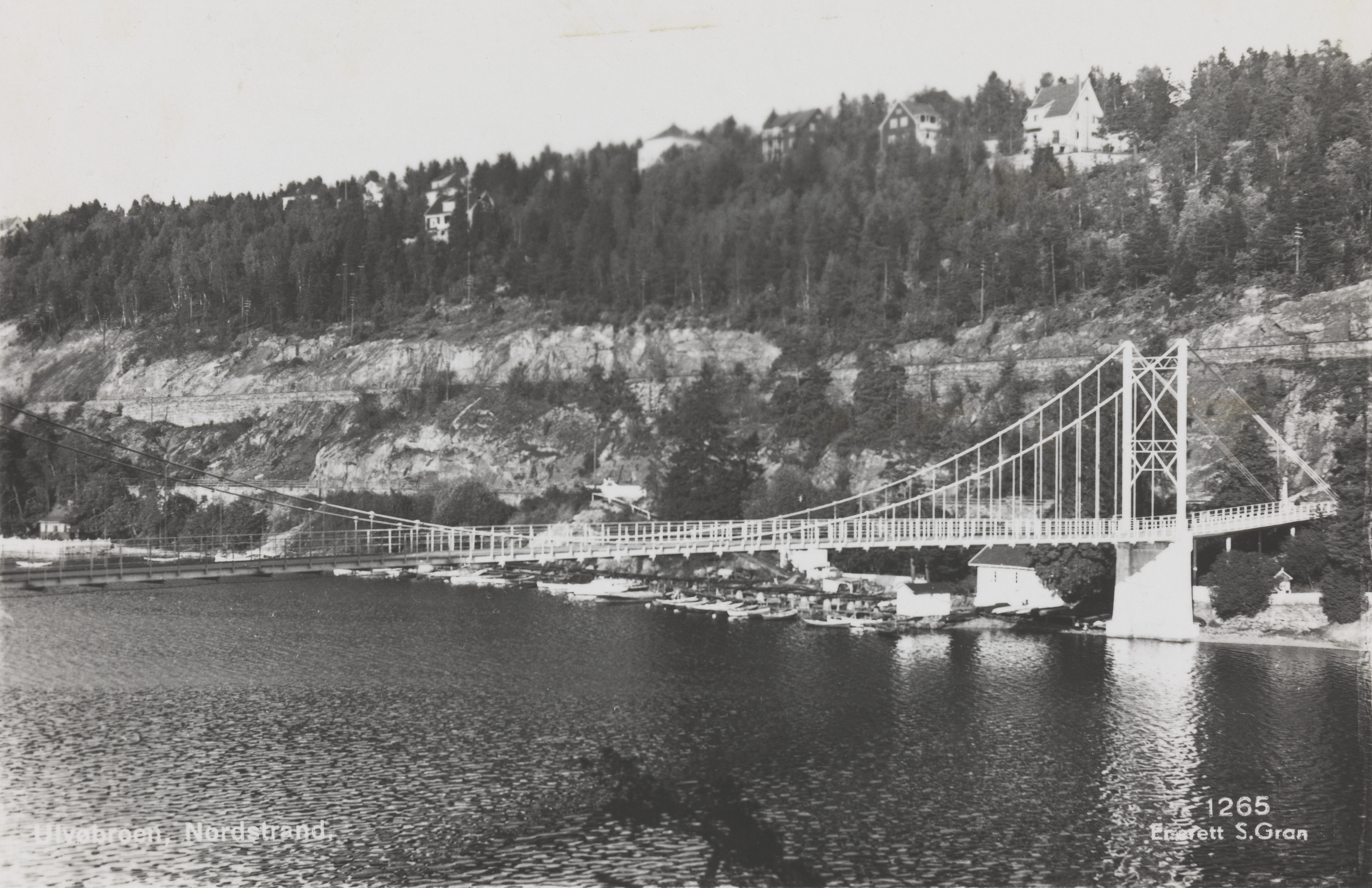 Bildet er hentet fra Nasjonalbibliotekets bildesamling Nordstrand, Oslo, Oslo